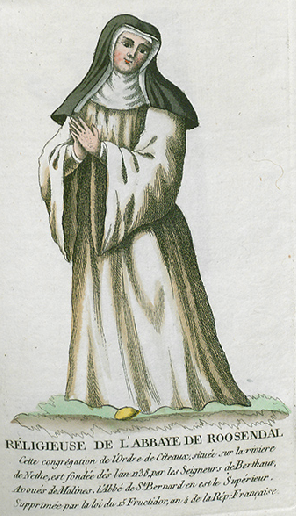 Collection de costumes de tous les ordres monastiques, supprimés à differentes époques, dans la ci-devant Belgique, Bruxelles, Philippe Joseph Maillart et sœur, 1811